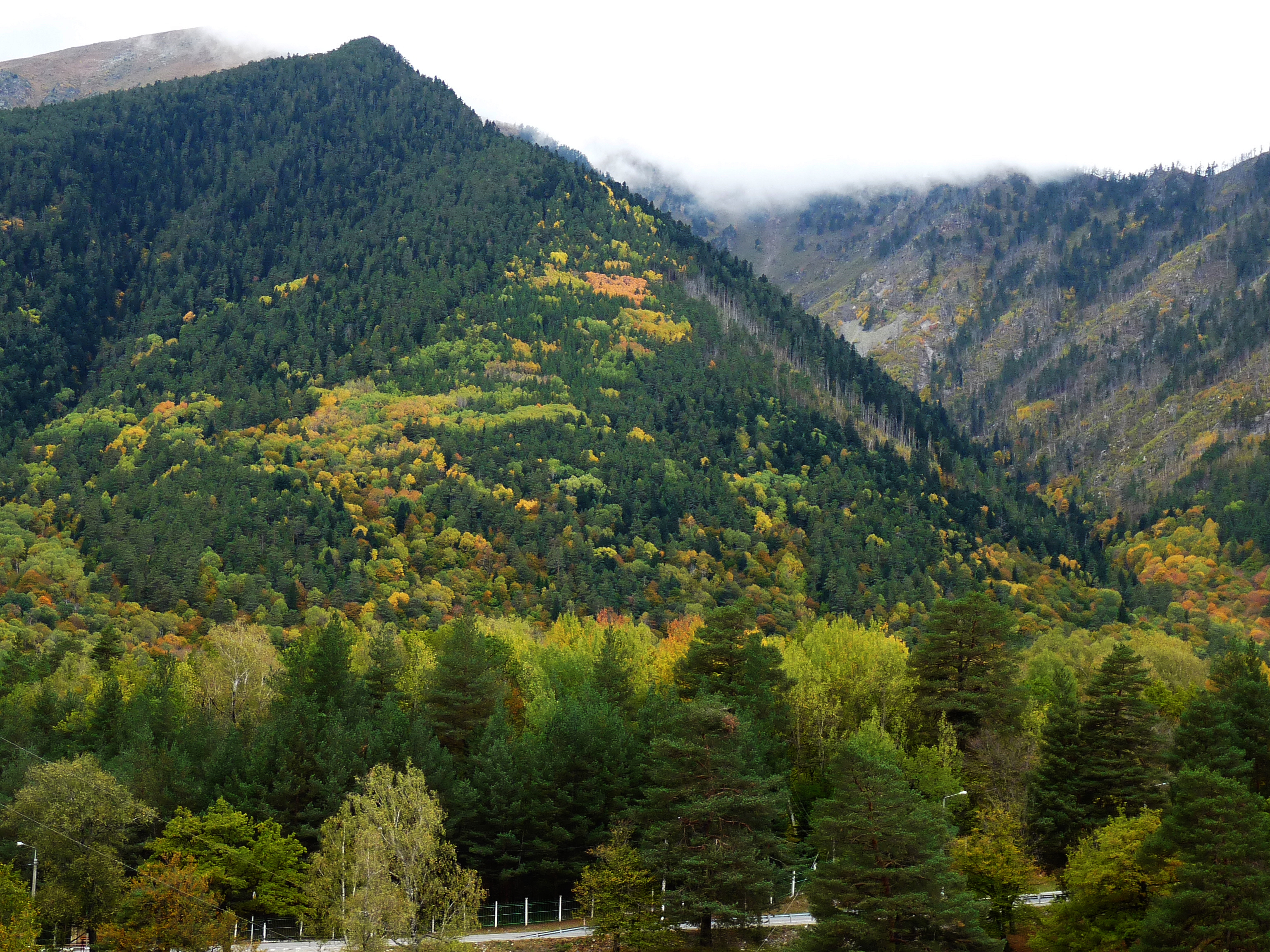 Тебердинский заповедник, Зеленчукский район This image is related to the protected area of Russia number 0900019